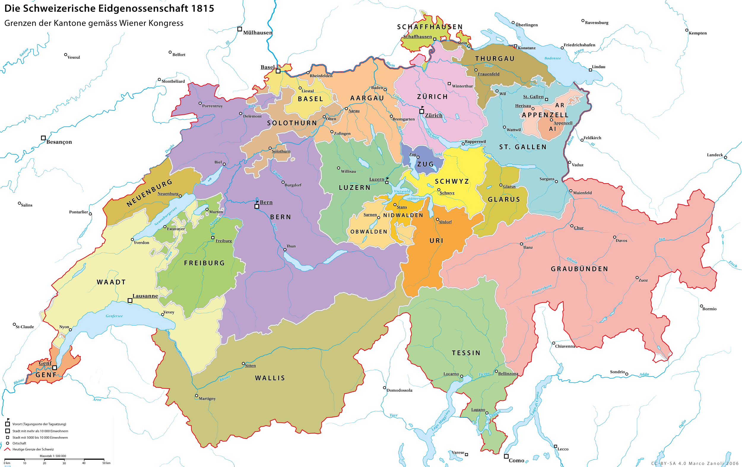 Die Schweizerische Eidgenossenschaft während der Restaurationszeit 1814–1847